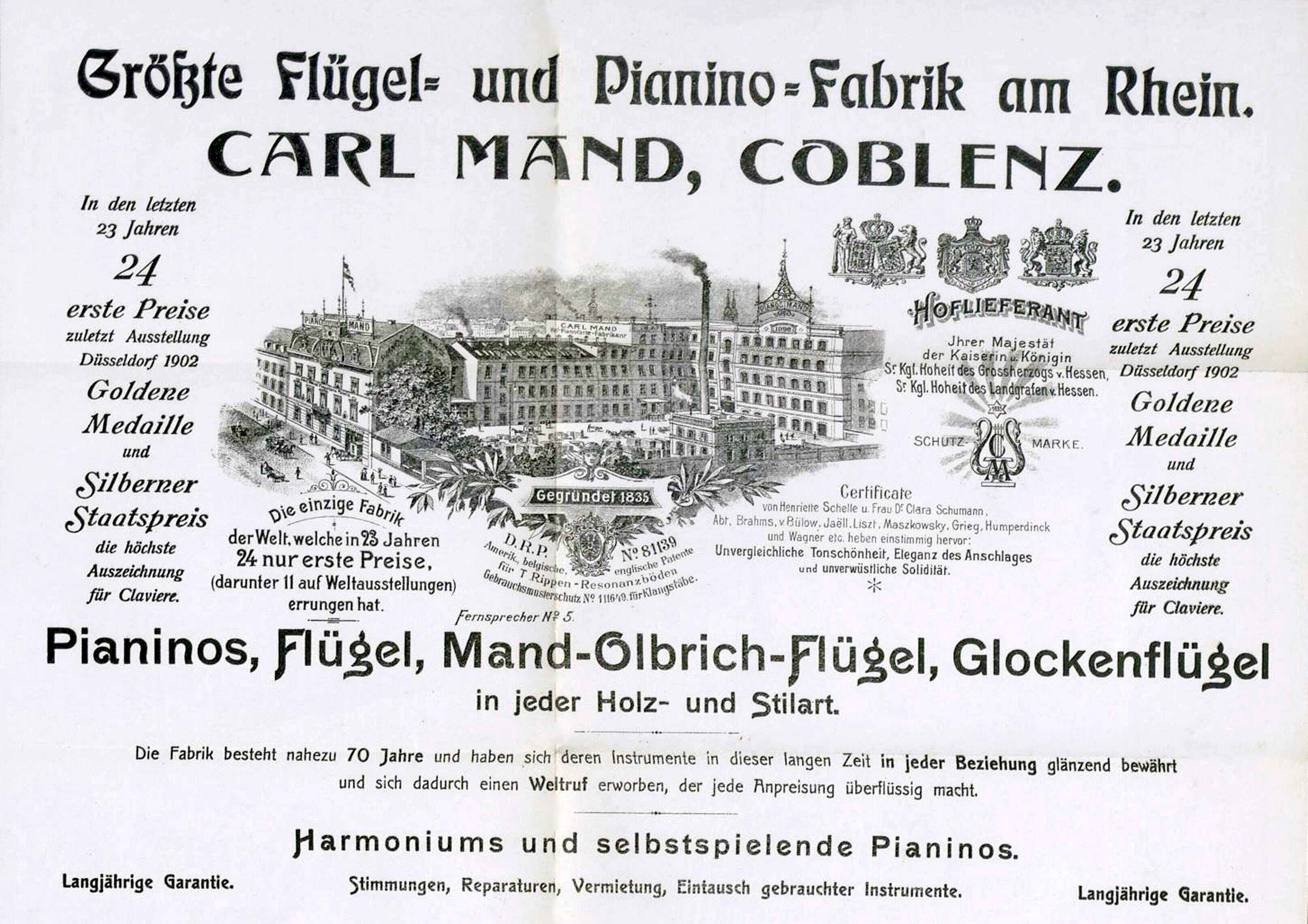 Werbeanzeige der Flügel- und Pianino-Fabrik Carl Mand 1903 mit Darstellung der Geschäfts- und Fabrikräume 1903